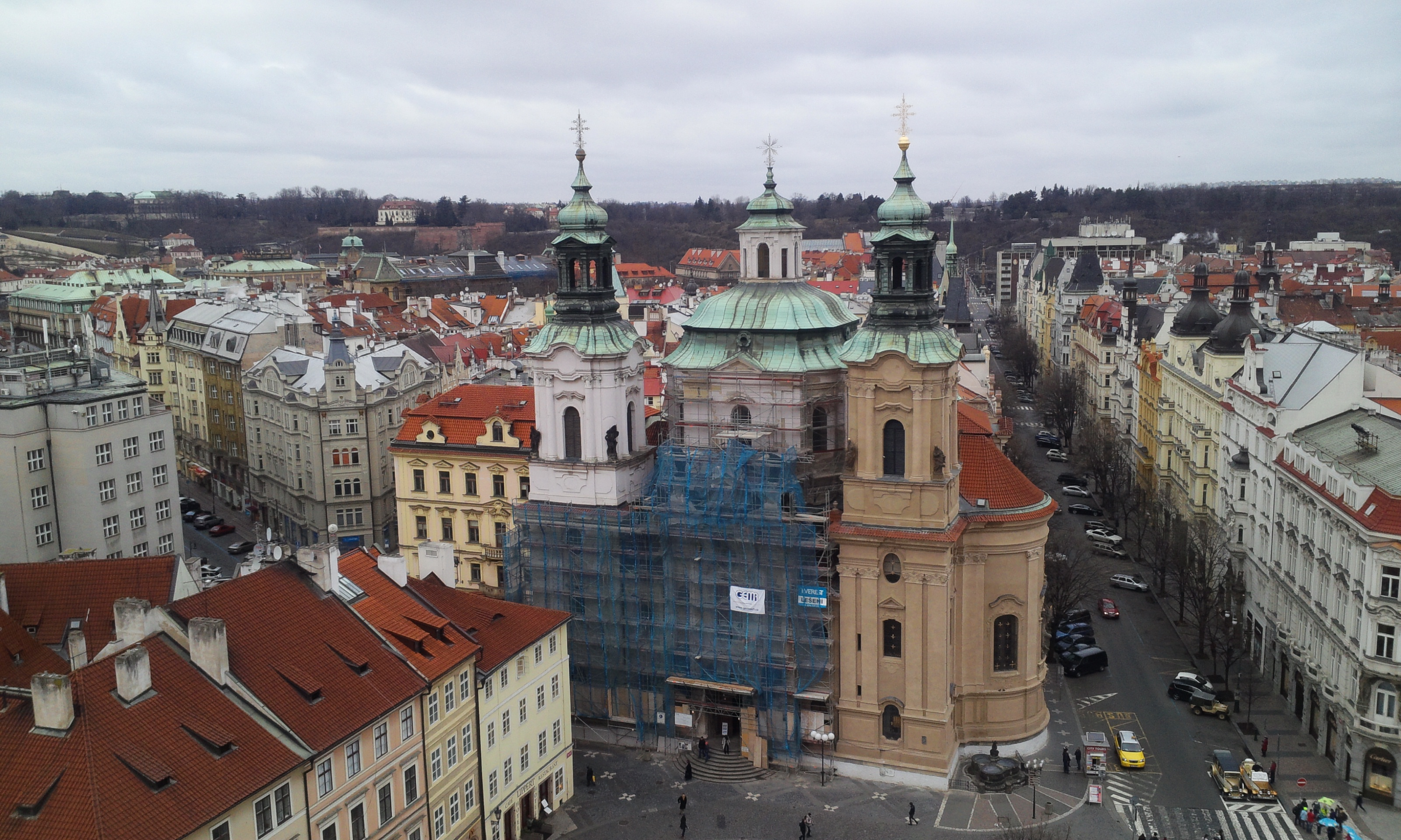 2015년 1월 25일 프라하 천문시계탑에서 바라본 성 니콜라스 성당